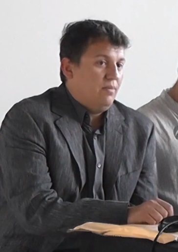 Conferencia a cargo del historiador Ángel Viñas sobre el bombardeo de Gernika junto con el historiador y profesor de la Universidad de Nevada, Xabier Irujo. También presentaron la nueva edición del libro de Herbert R. Southworth "La destrucción de Guernica". En la mesa, de izquierda a derecha: Miguel Ángel del Arco (Editorial Comares), Xabier Irujo (historiador), Jose Mª Gorroño (Alcalde de Gernika-Lumo) y Ángel Viñas (historiador). En el edificio Astra de Gernika a las 19.00 h.